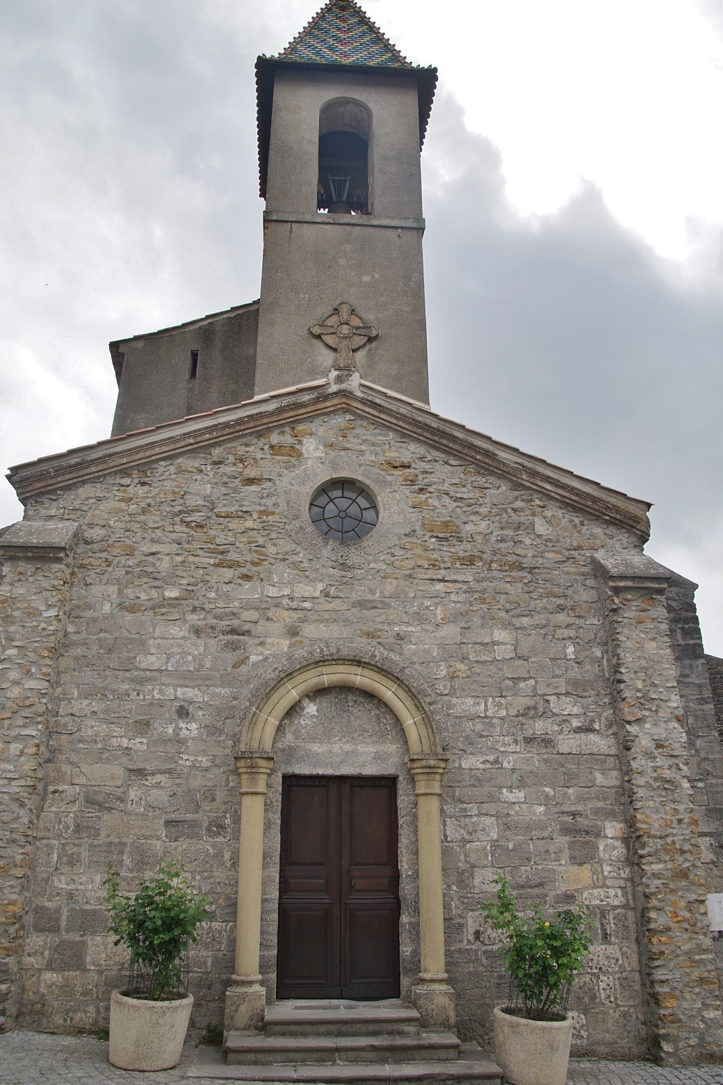 église Saint Brice